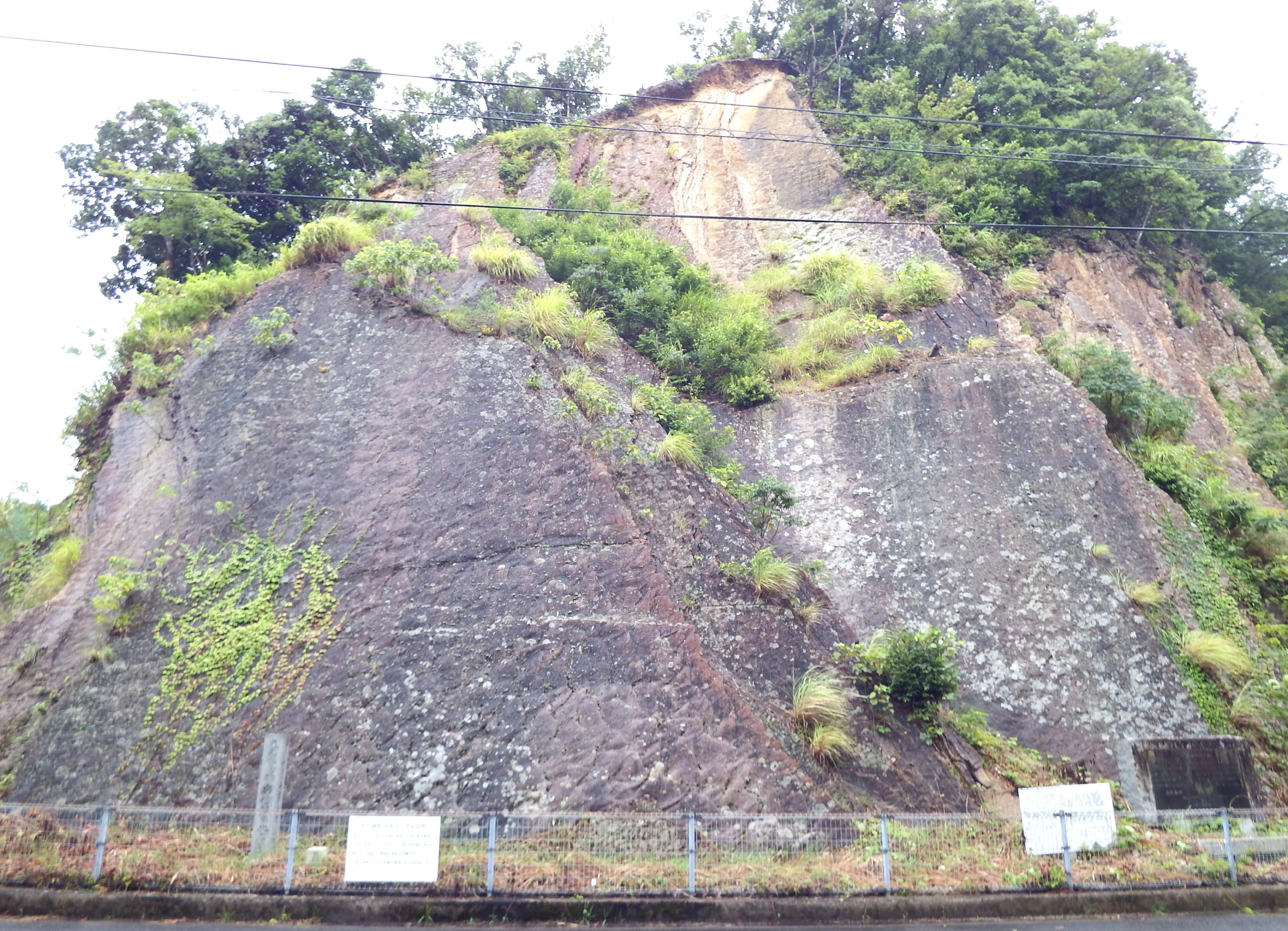 宍喰浦の化石蓮痕